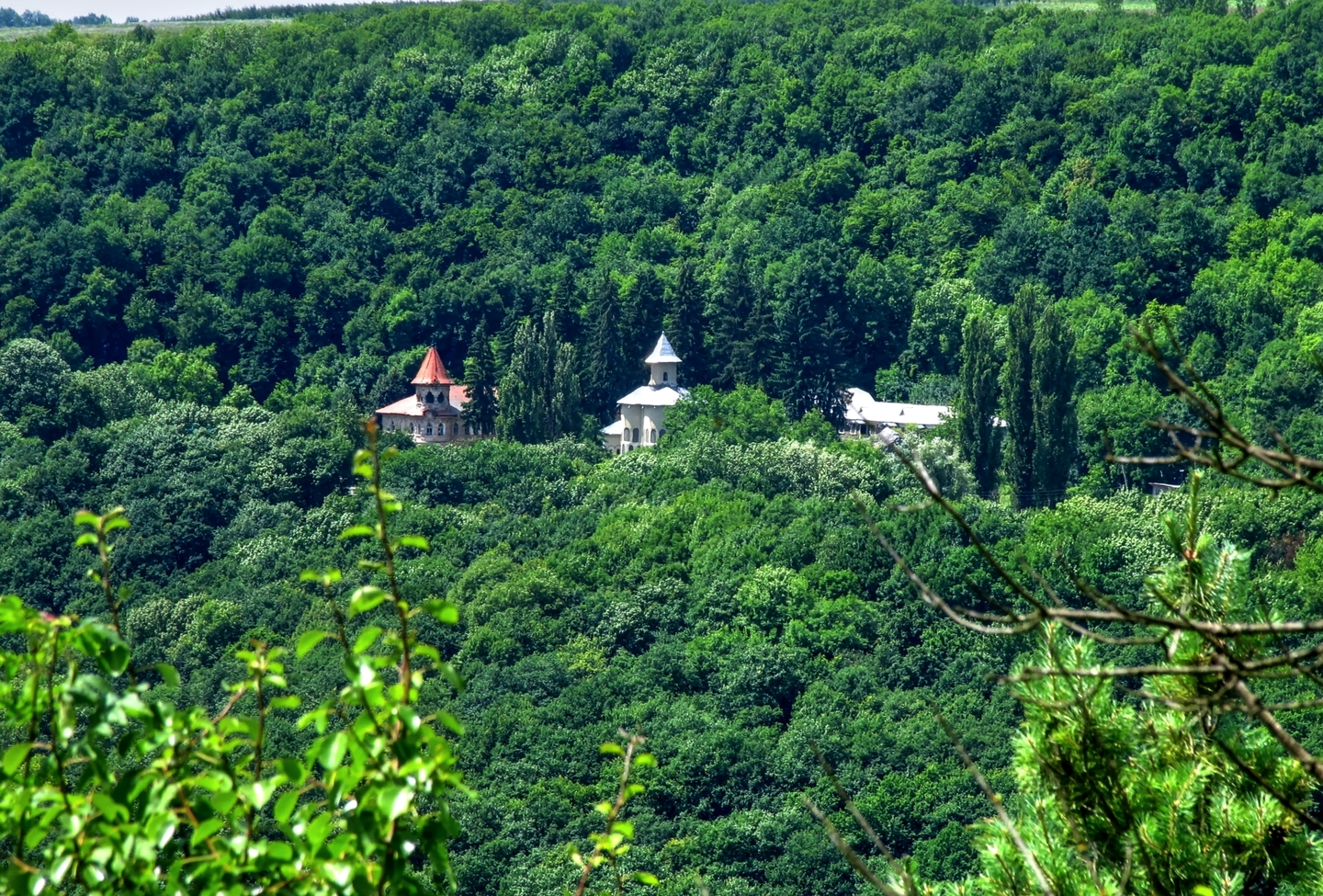 Рудь-Арионешть, монумент природы, находится в Дондушенский район, В 10 км от Отачь по течению р. Днестр, Отачское лесничество, урочище Арионешть-Стынка, кварталы 20-22; урочище Рудь-Гаван, кварталы 23-29 (код MD-DN-rp-017)